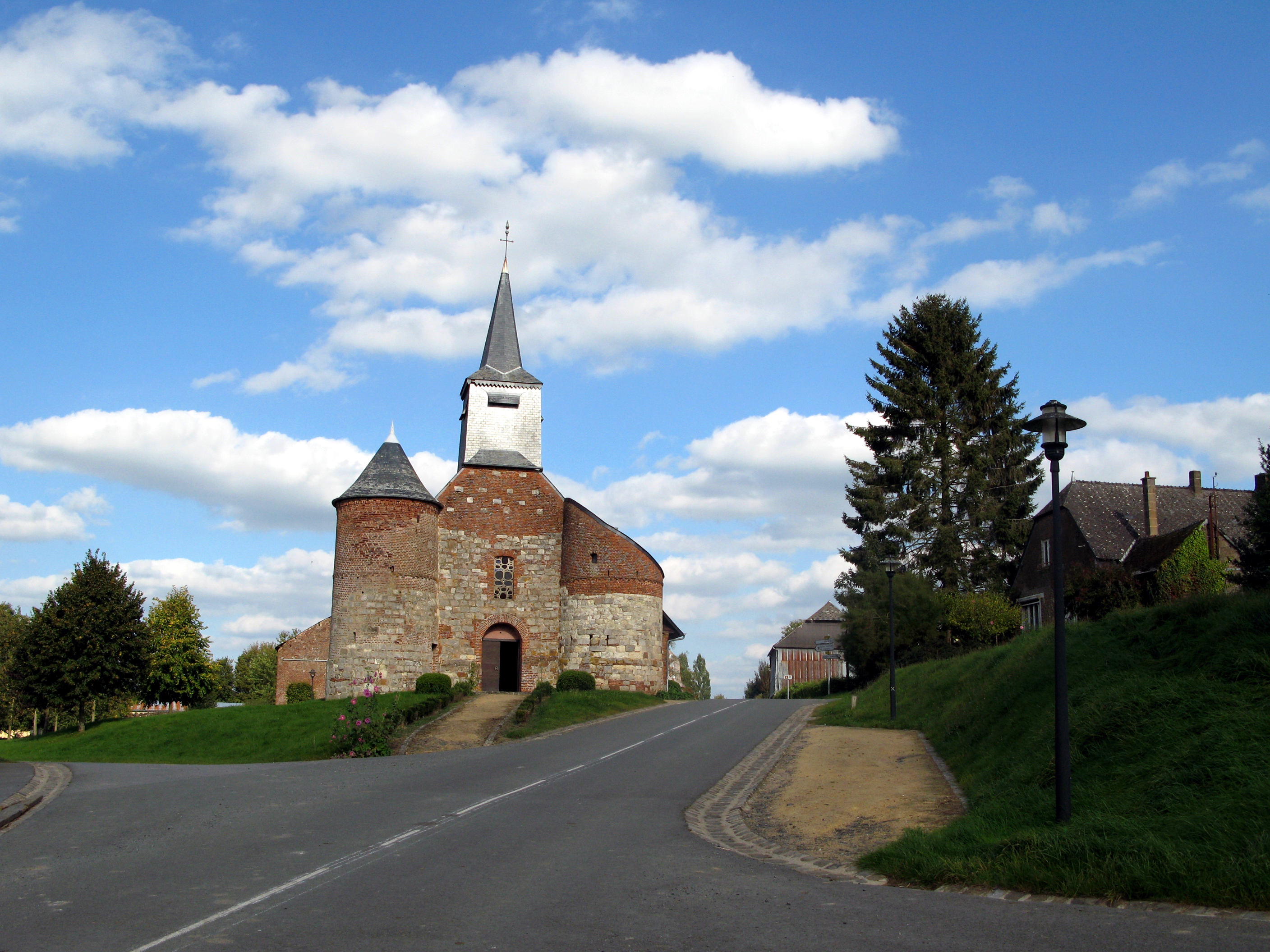 Bancigny (Aisne, France) - L'église fortifiée.